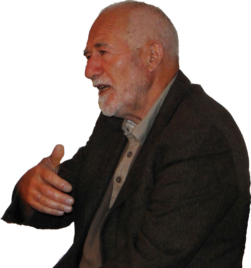 Maciej Krzeptowski - polski żeglarz